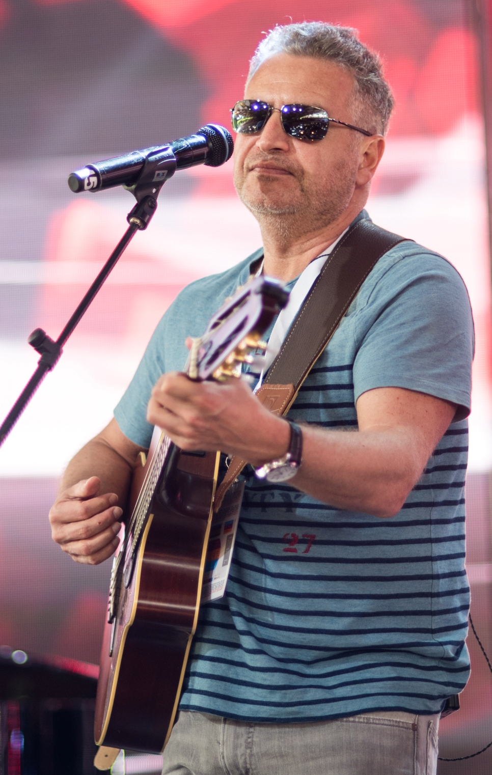 Леонид Агутин на репетиции фестиваля «Лайма. Рандеву. Юрмала 2017»